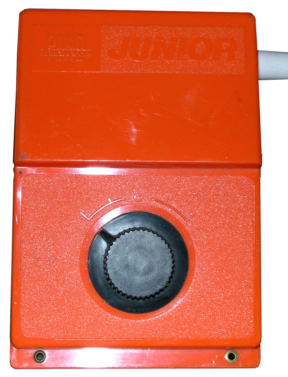 Piko „Junior“ Trafo